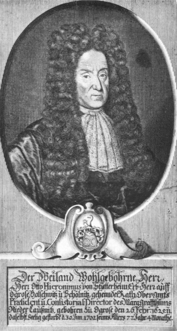 Otto Hieronymus von Stutterheim (26.02.1625-30.06.1702) Oberamtsregierungspräsident und Konsistorialdirektor der Niederlausitz Der Weiland Wohlgebohrne Herr, Herr Otto Hieronimus von Stutterheim, Erb-Herr auff Ogrose, Bolschwitz u Schölnitz, geheimder Rath, Ober-Amts Präsident u. Consistorial-Director des Marg-Graffthums Nieder Lausitz, gebohren zu Ogose den 26. Febr: 1625. u. daselbst seelig gestorben d. 30. Jun. 1702 seines Alters 77. Jahr 4. Monathe.